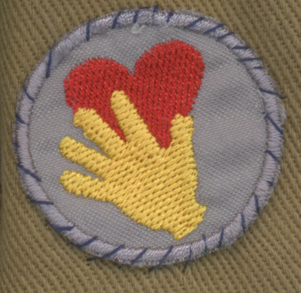 Sprawność pomocnej dłoni